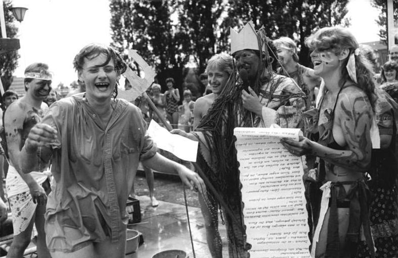 ADN-ZB Uhlemann 28.7.85 Berlin: Studentensommer- Auf den Namen "Zahnloser Algenfresser" wird Janette Klier (r.) beim Sport- und Neptunfest im Schwimmstadion in der Siegfriedstraße getauft. Die Studentin beteiligt sich mit 1 100 Kommilitonen aus Leipzig und Halle am Studentensommer in Berlin und wohnt im FDJ-Zeltlager "IX. Parteitag der SED" in der Herzbergstraße (Berlin-Lichtenberg).